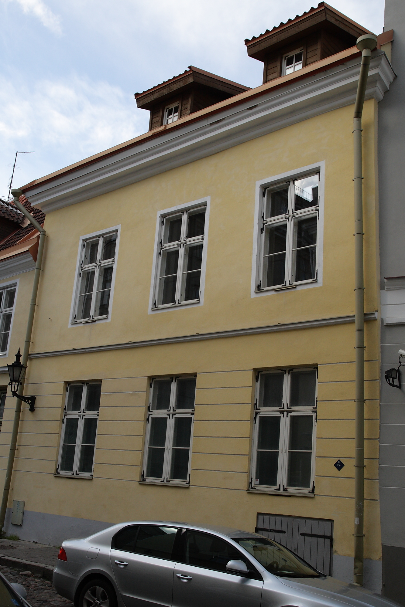 Tallinn, elamu Lai 37 hooviansambliga, 15.-19.saj